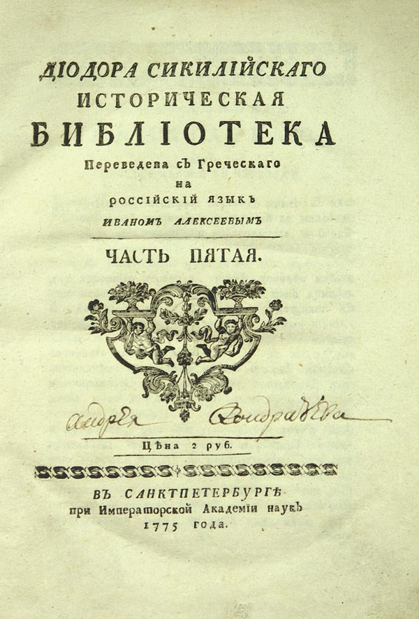 Титульный лист книги "Диодора Сикилийсаго Историческая библиотека"